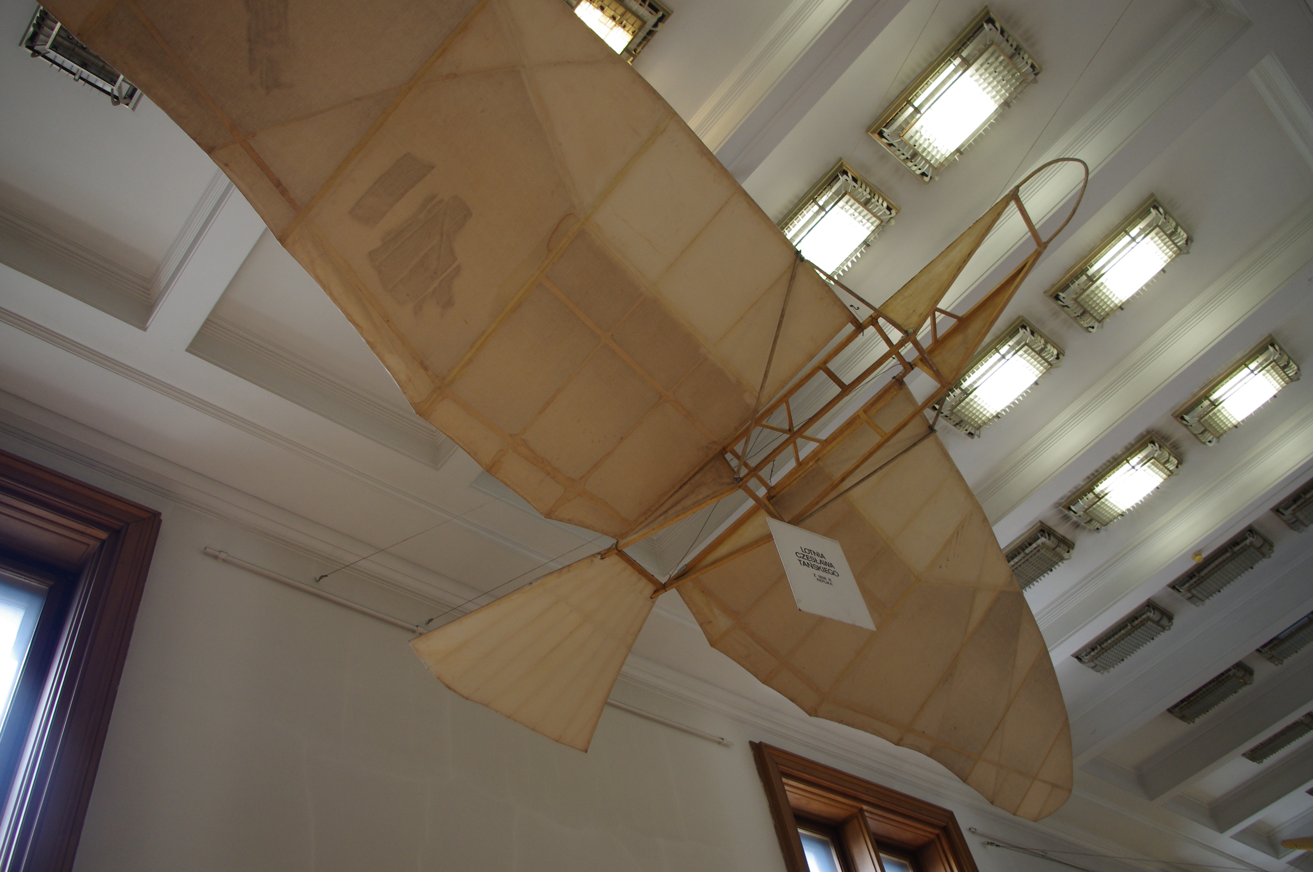 Replika lotni Czesława Tańskiego w Muzeum Techniki w Pałacu Kultury i Nauki w Warszawie (replica Tanski Lotnia